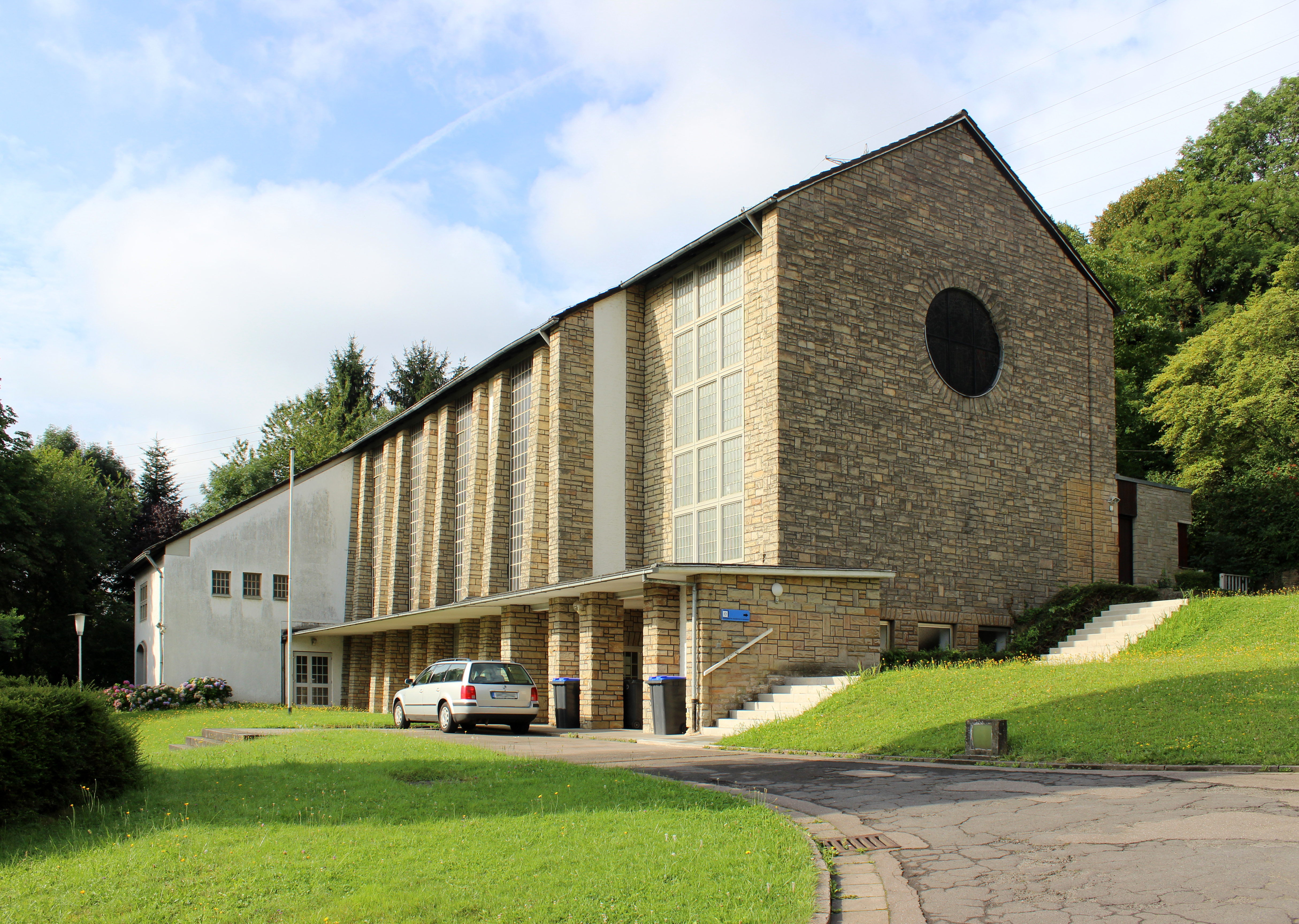 Die evangelische Auferstehungskirche in Wehrden, einem Stadtteil von Völklingen, Saarland